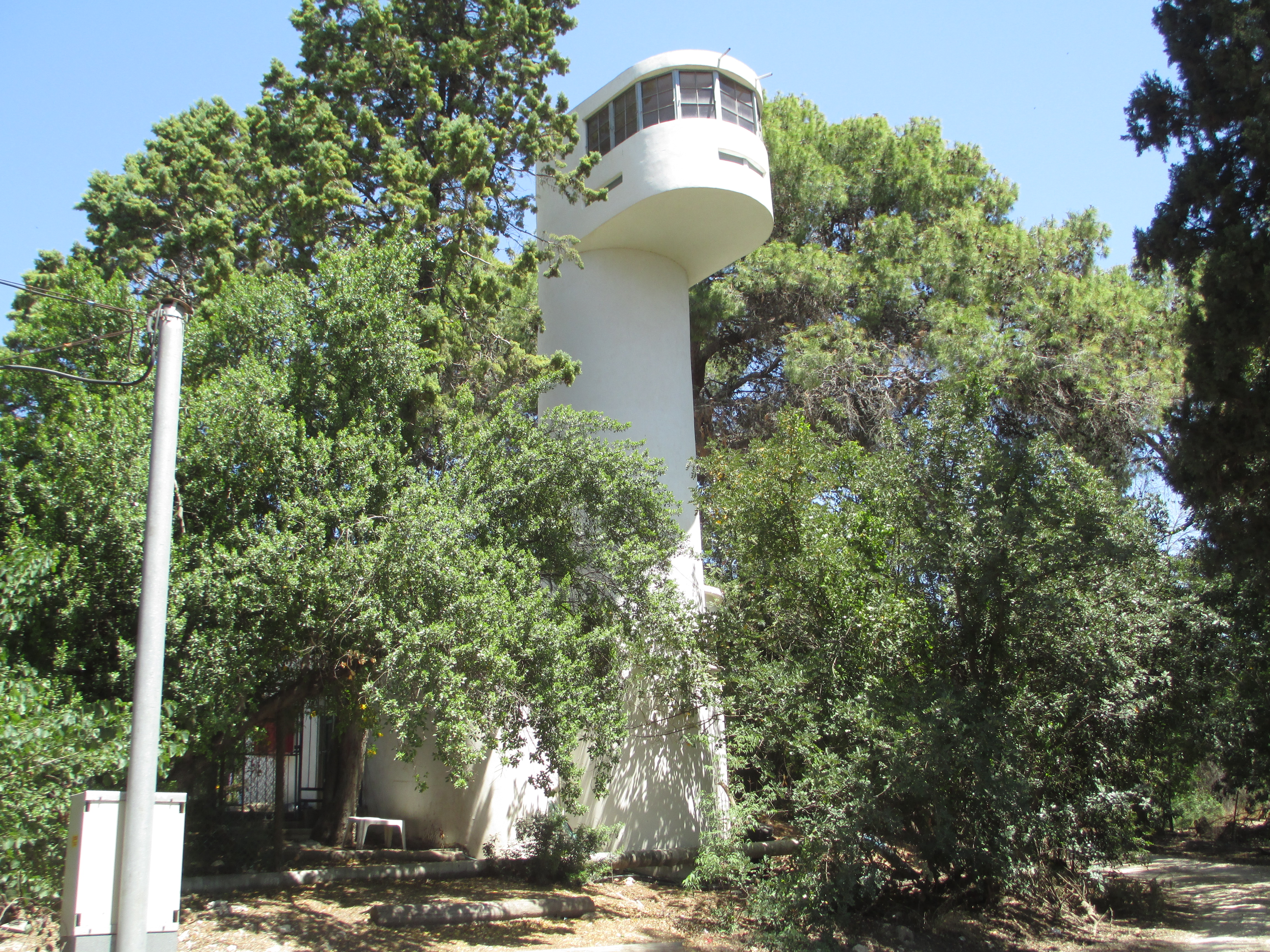 מגדל הגמל בגניגר